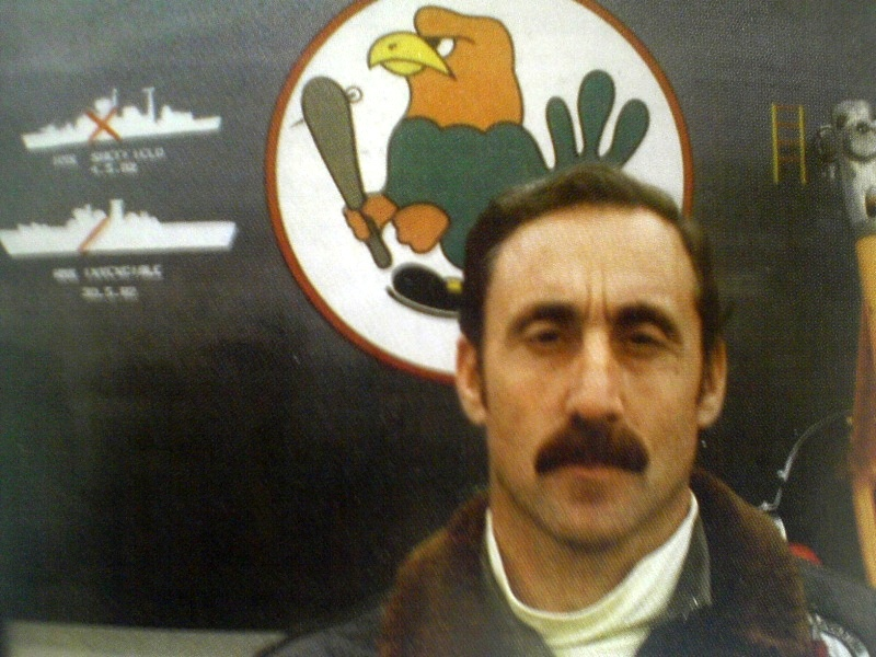 Il capitano di fregata Augusto Bedacarratz, pilota argentino dell'aereo Super Etendard che affondò il cacciatorpediniere britannico HMS Sheffield durante la guerra delle Falkland